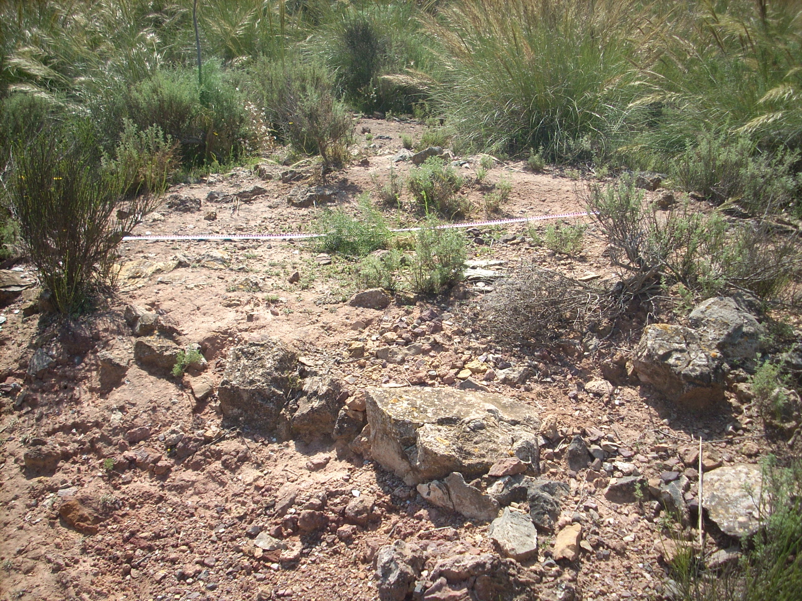 Restos murarios en el yacimiento arqueológico de Cañada Honda